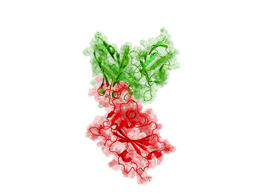 SARS-CoV-2 RBD in einem Komplex mit menschlichem S230 Antikörper